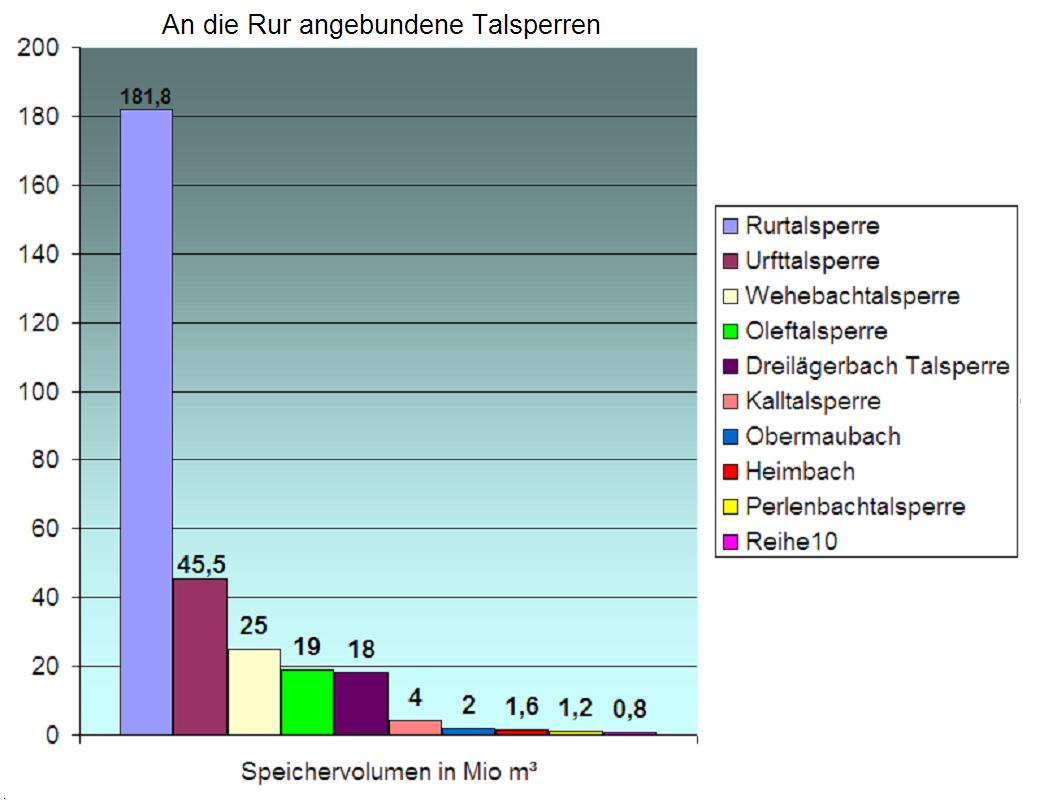 Talsperren der Eifel, die in die RUR entwässern